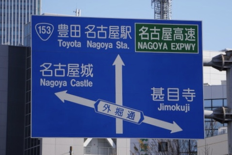 中村区則武本町にある愛知県道200号名古屋甚目寺線（外堀通）の案内標識